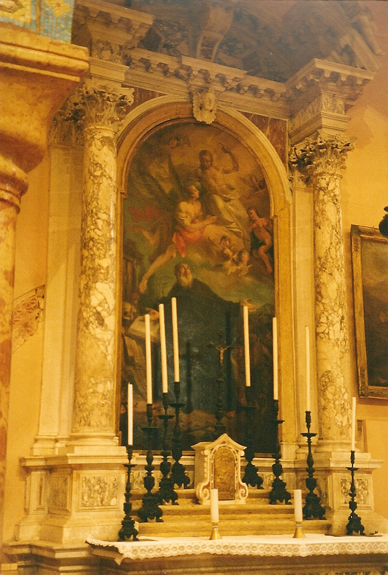 "Saint Antoine abbé résistant à la Tentation", huile sur toile de Francesco Zugno (1709-1787), 280cm x 144cm, Venise, église du couvent "San Lazzaro degli Armeni".